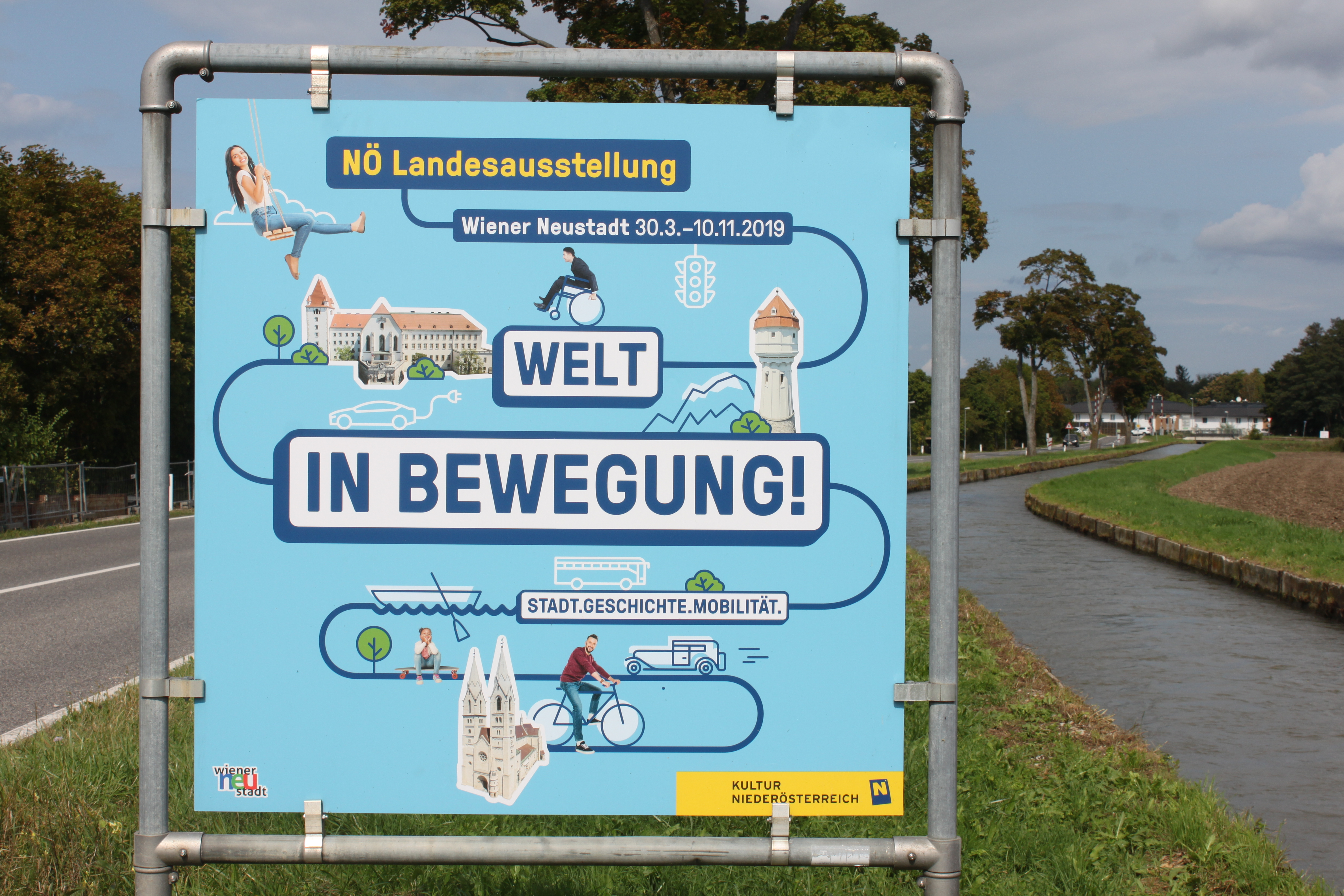 Niederösterreichische Landesausstellung 2019 Ankündigung bei der Einfahrt in Wiener Neustadt, von Katzelsdorf kommend, rechts der Kehrbach